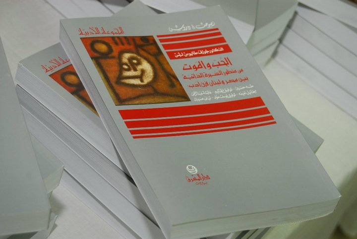 couverture